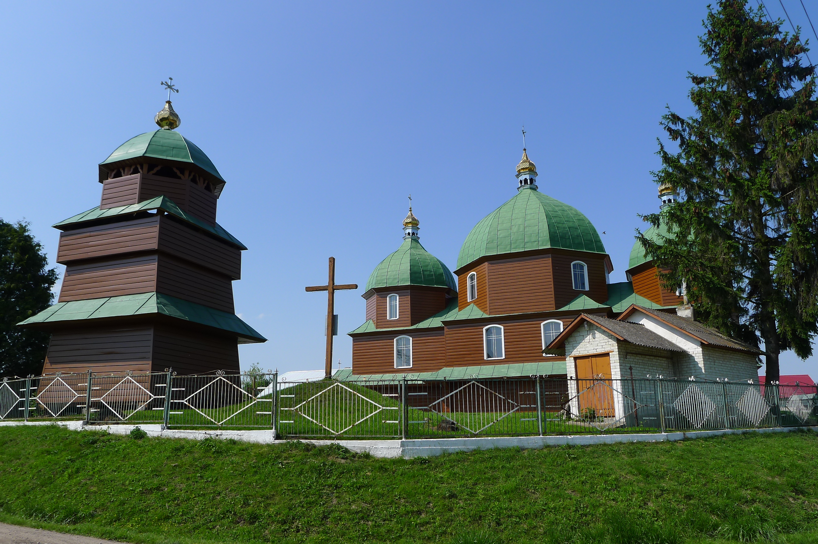 Каплиця Собора Івана Хрестителя, с. Волоща